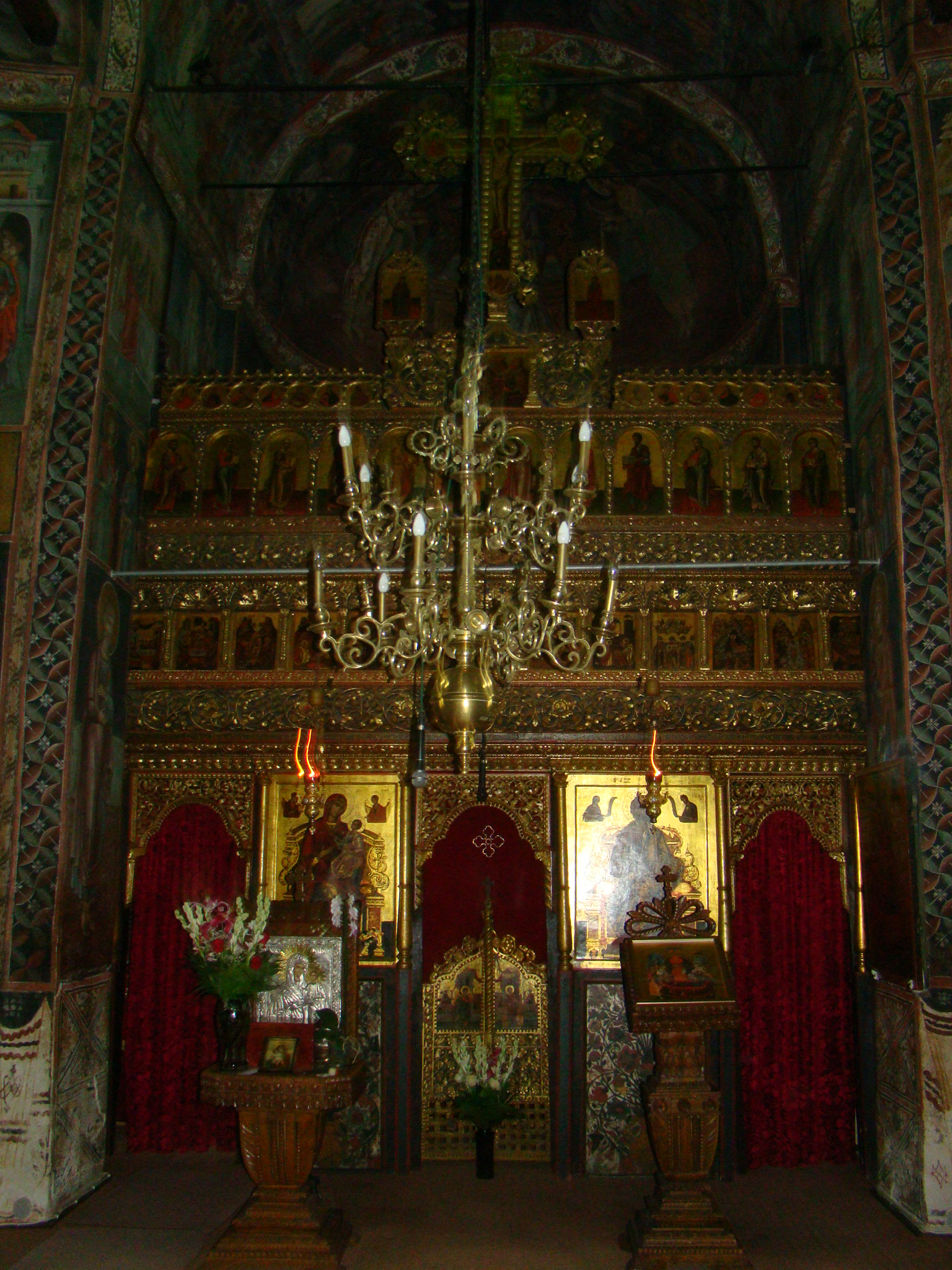 Altarul Manastirii Govora